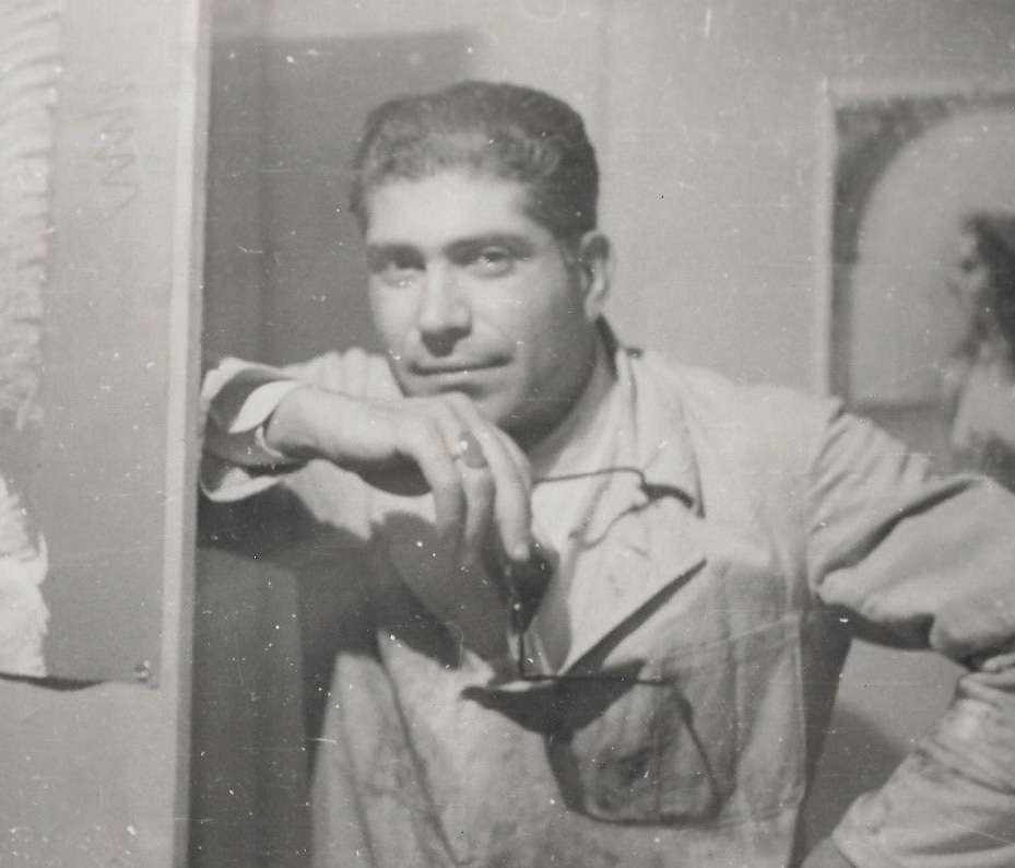 Un giovane Mario D'Antona nel suo atelier.